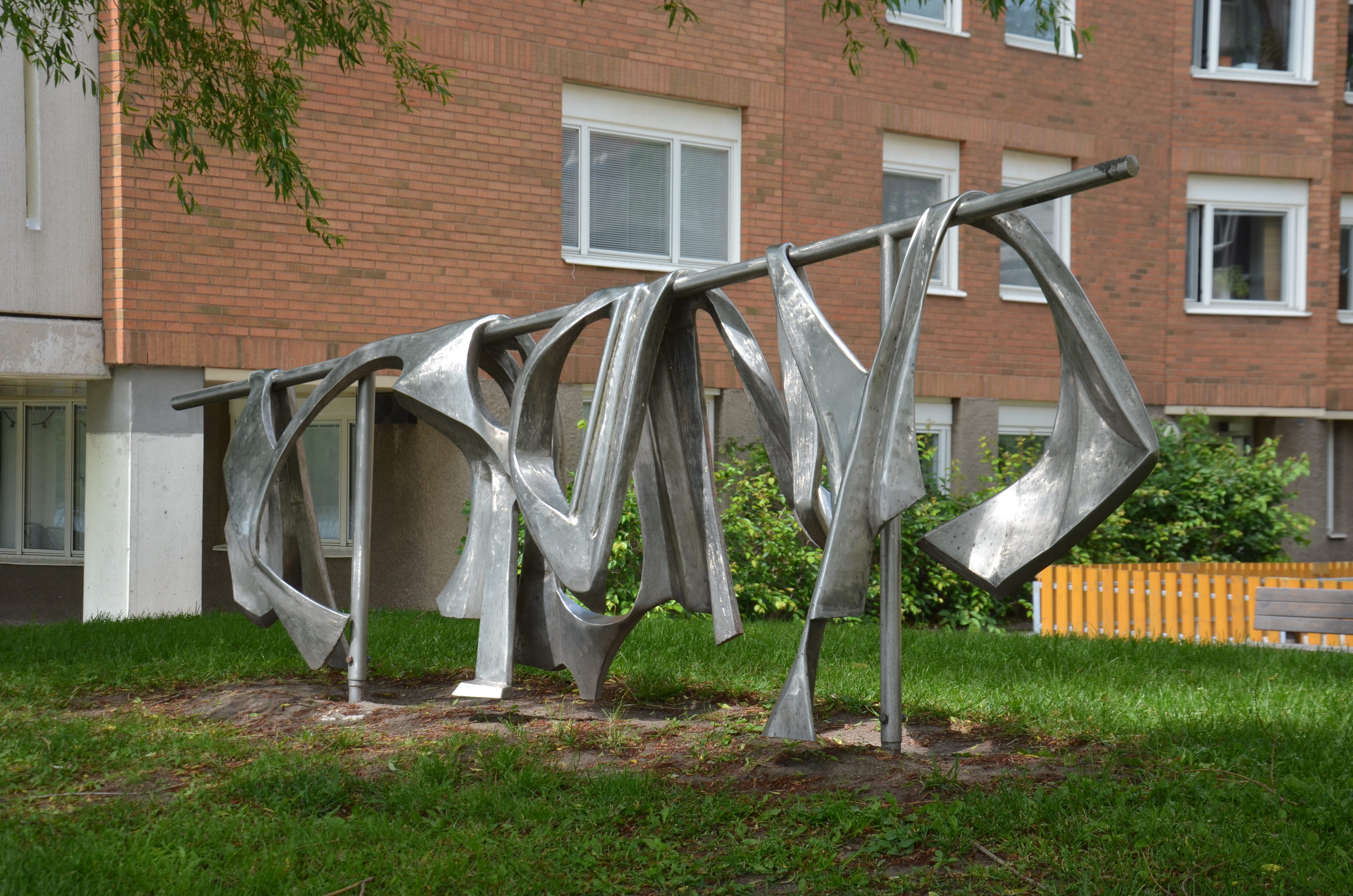 Nils Dahlgrens Fisknät på tork,rostfritt stål, Reimersholmskajen i Stockholm